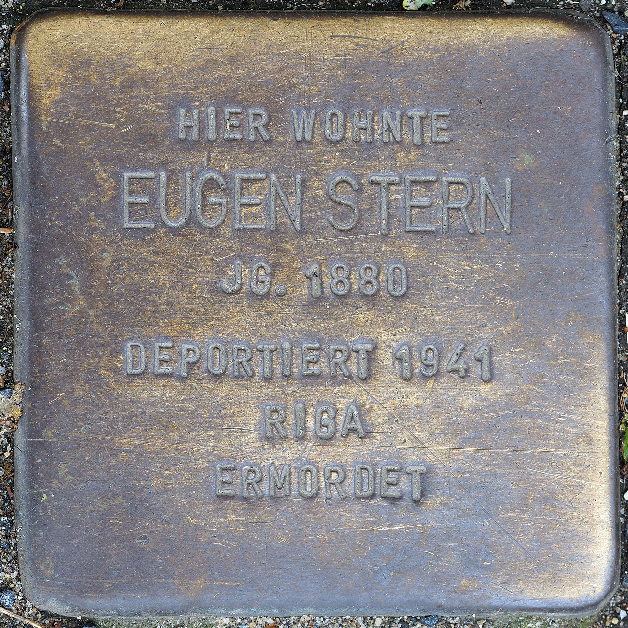 Stolpersteine MG: Stern, Eugen